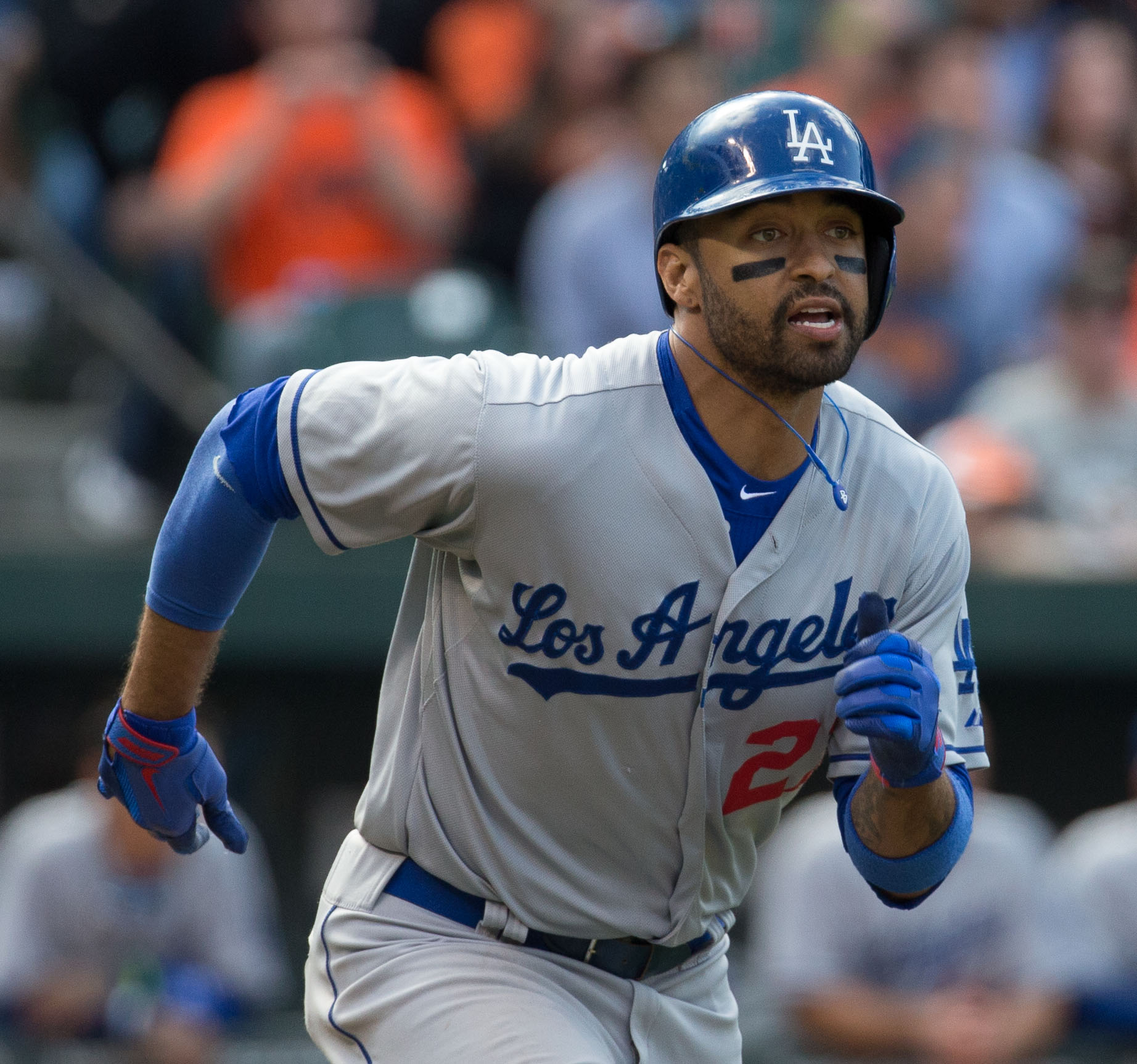 Matt Kemp